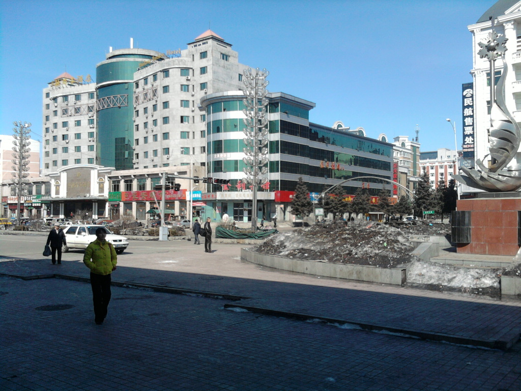 黑龙江大兴安岭地区加格达奇市 站前街